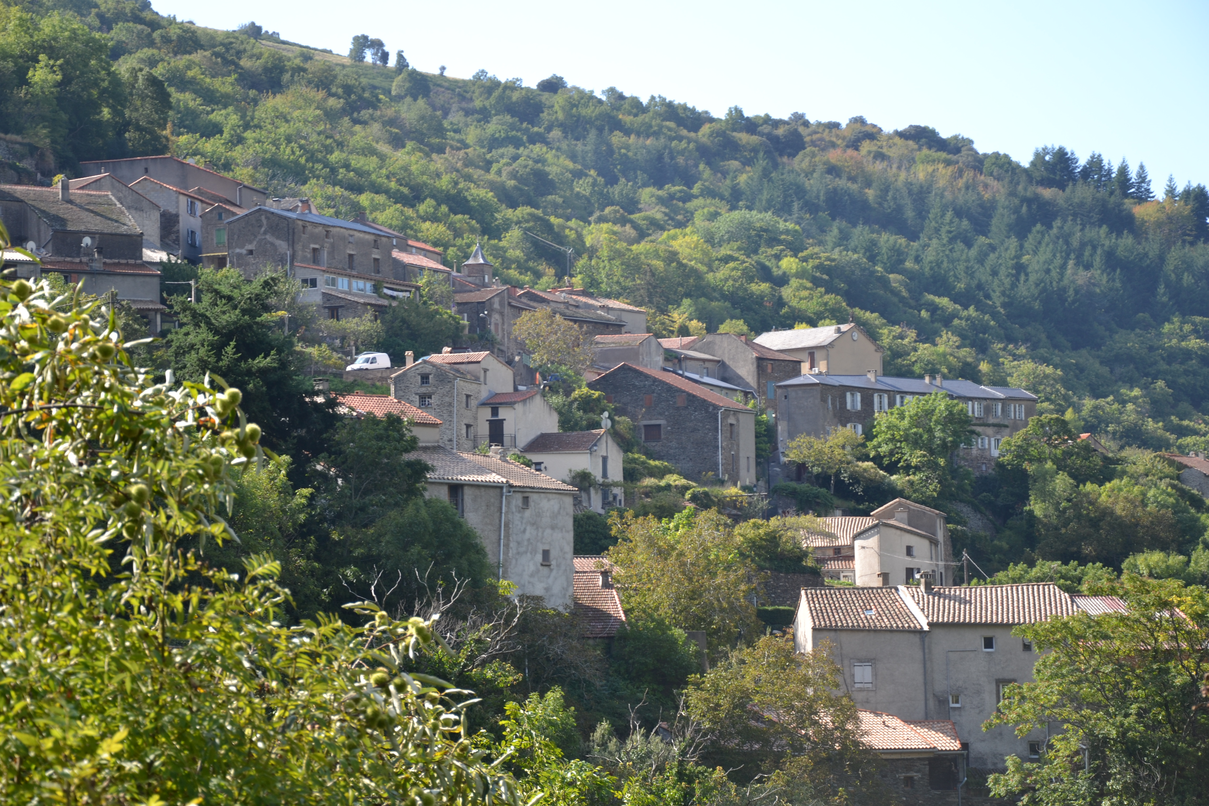 Vue générale de Labastide